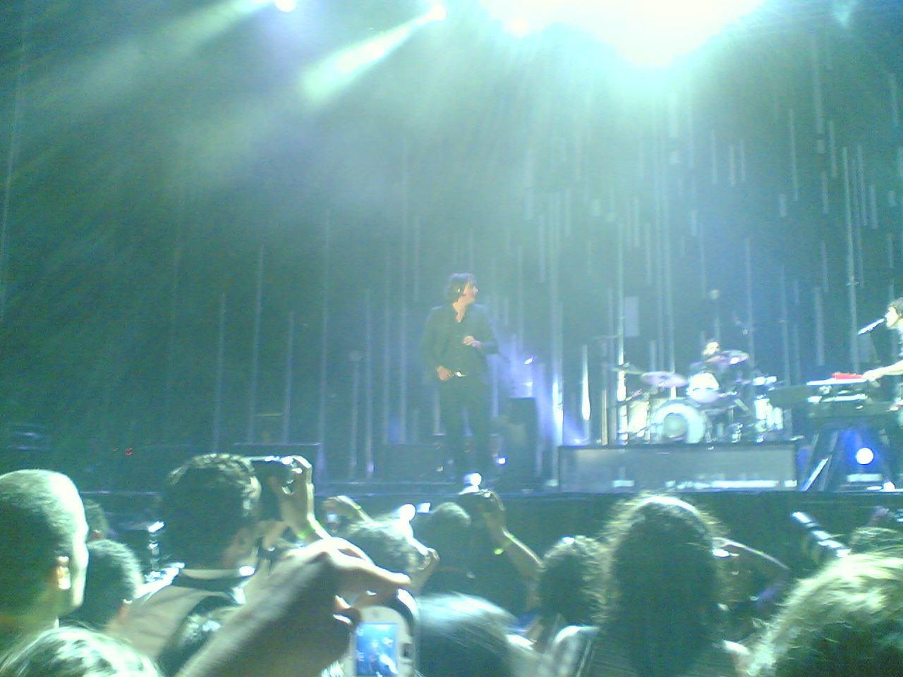 Keane ao vivo no Super Bock Super Rock 2006, Portugal